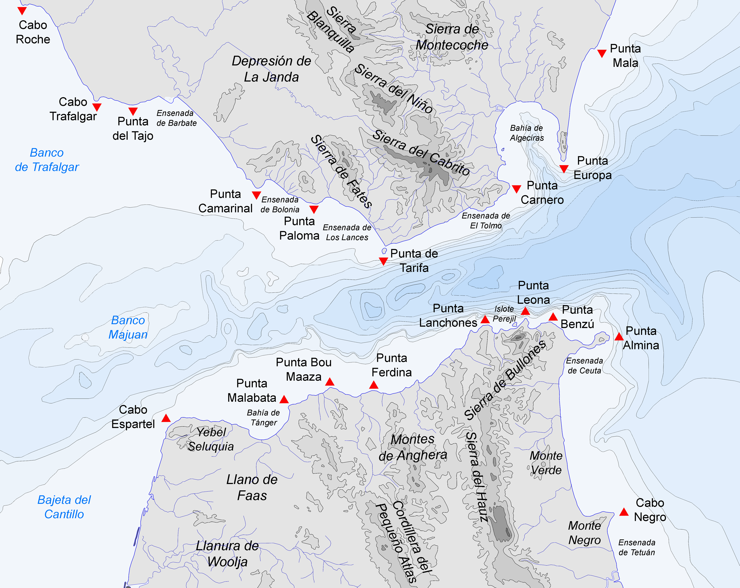 Mapa topográfico del Estrecho de Gibraltar.